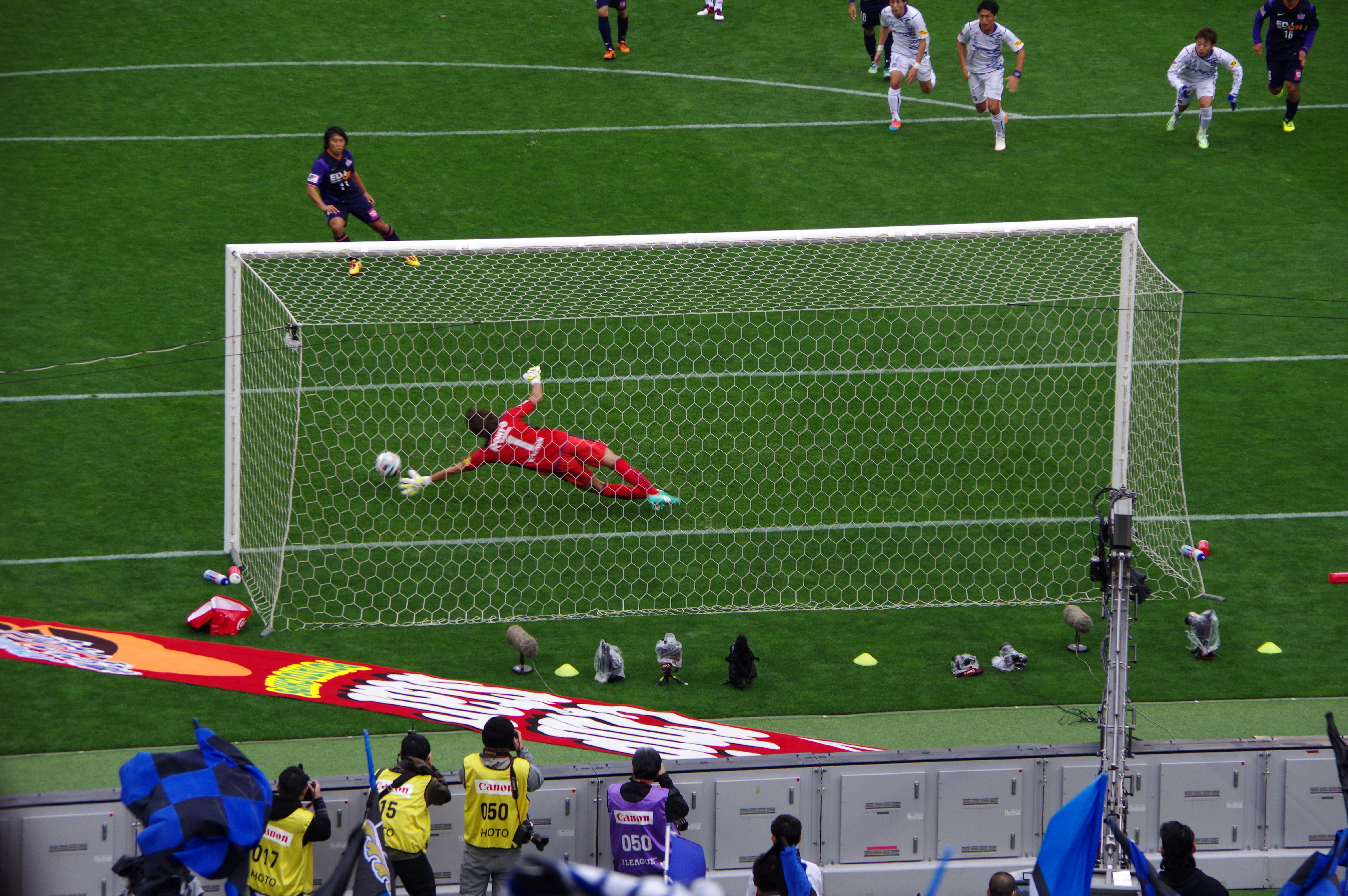 【ガンバ大阪】ナビスコ杯2014優勝_012